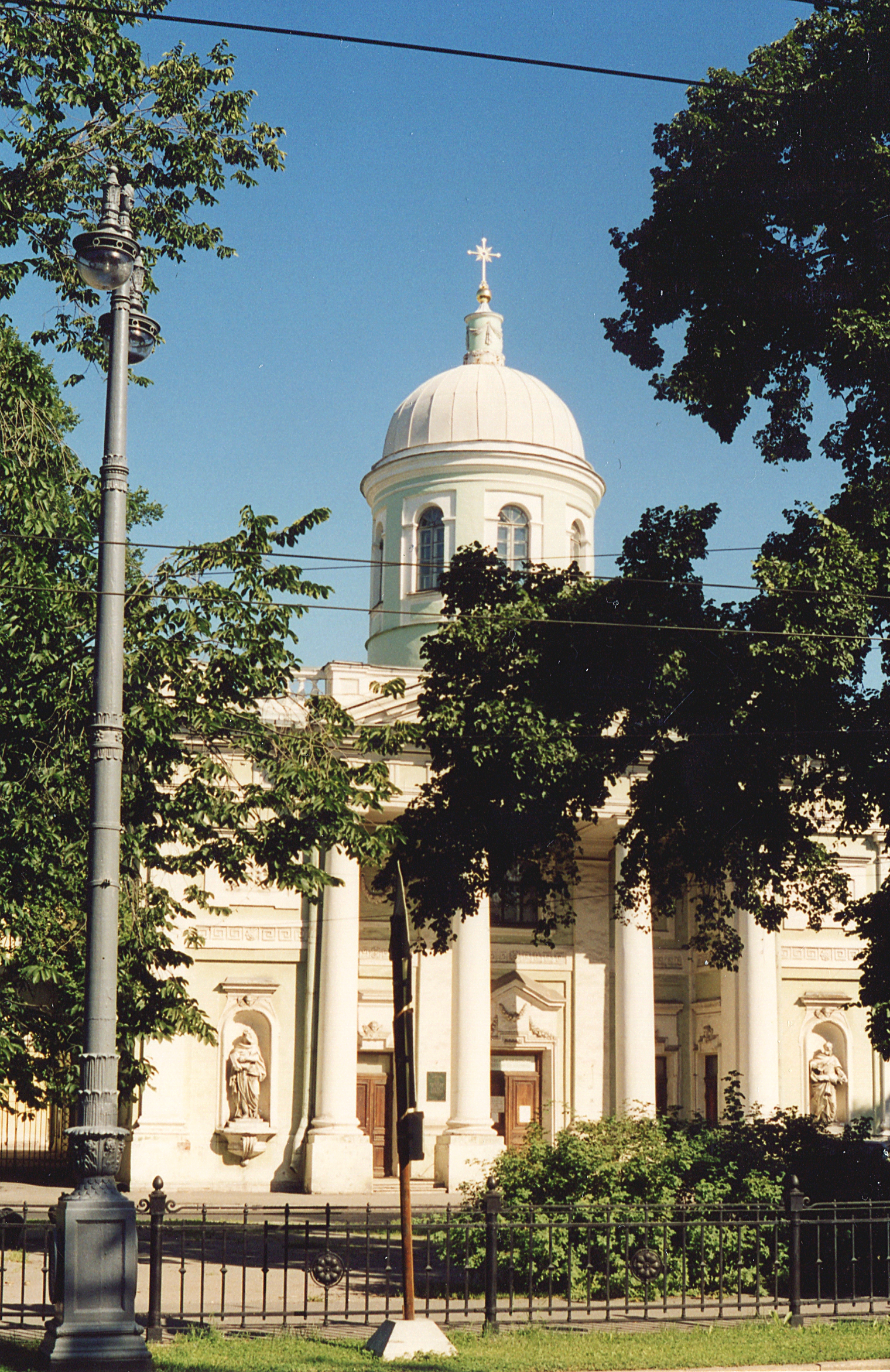 Фельтен Юрий Матвеевич (1730 -1801) Кирха св.Екатерины на В.О.